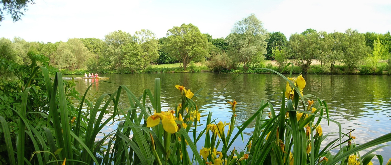 Brda na graicy osiedli Bydgoszcz Wschód i Kapuściska w Bydgoszczy